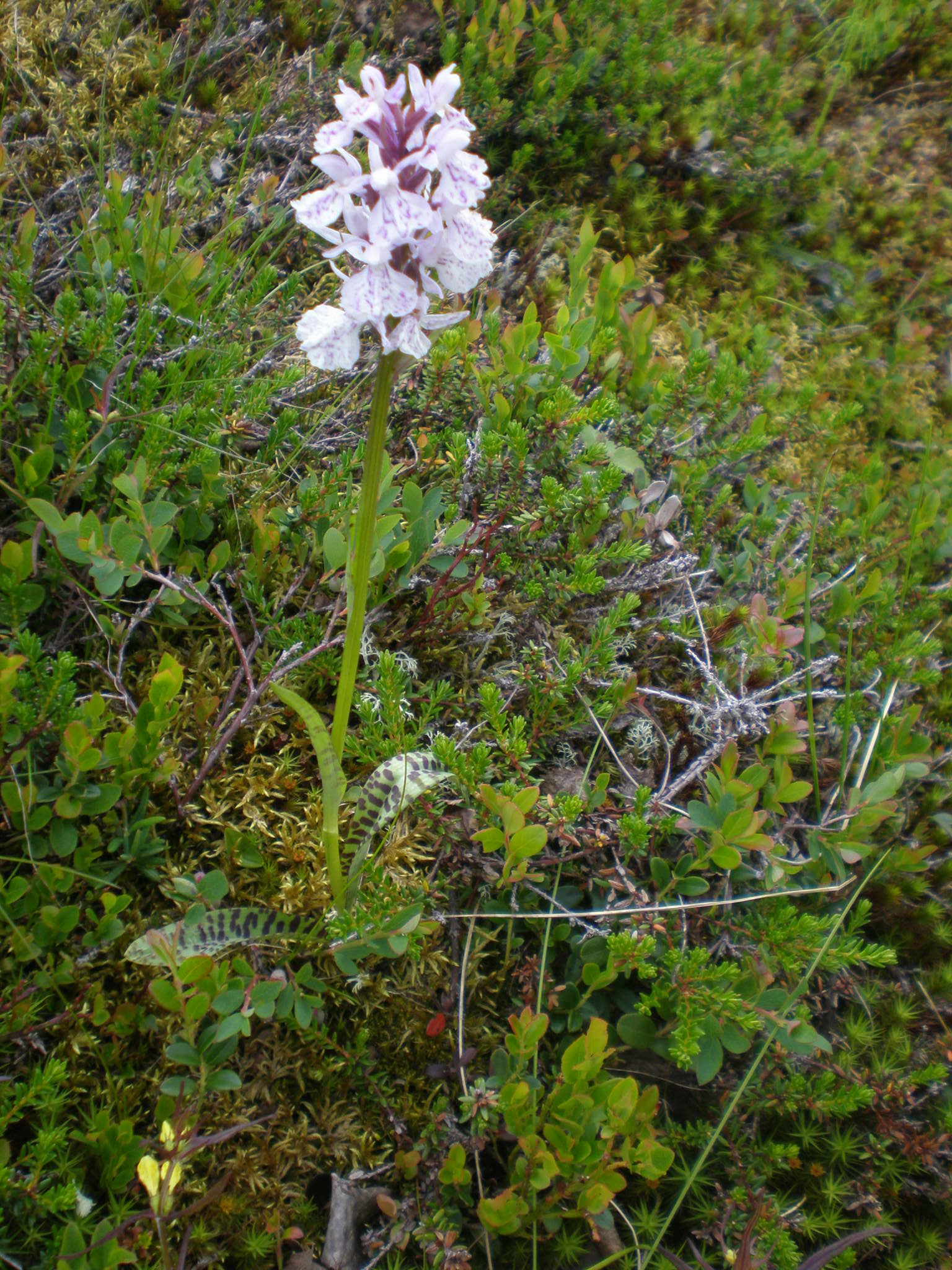 Jungfru Marie Nycklar i Västerbotten